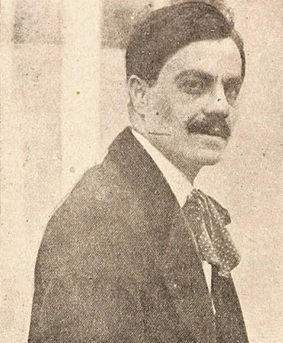 Rafael Maluenda en 1911. Rafael Maluenda Labarca (18 de marzo de 1885-4 de septiembre de 1963) fue un periodista y escritor chileno, director del diario local El Mercurio y Premio Nacional de Periodismo 1954.